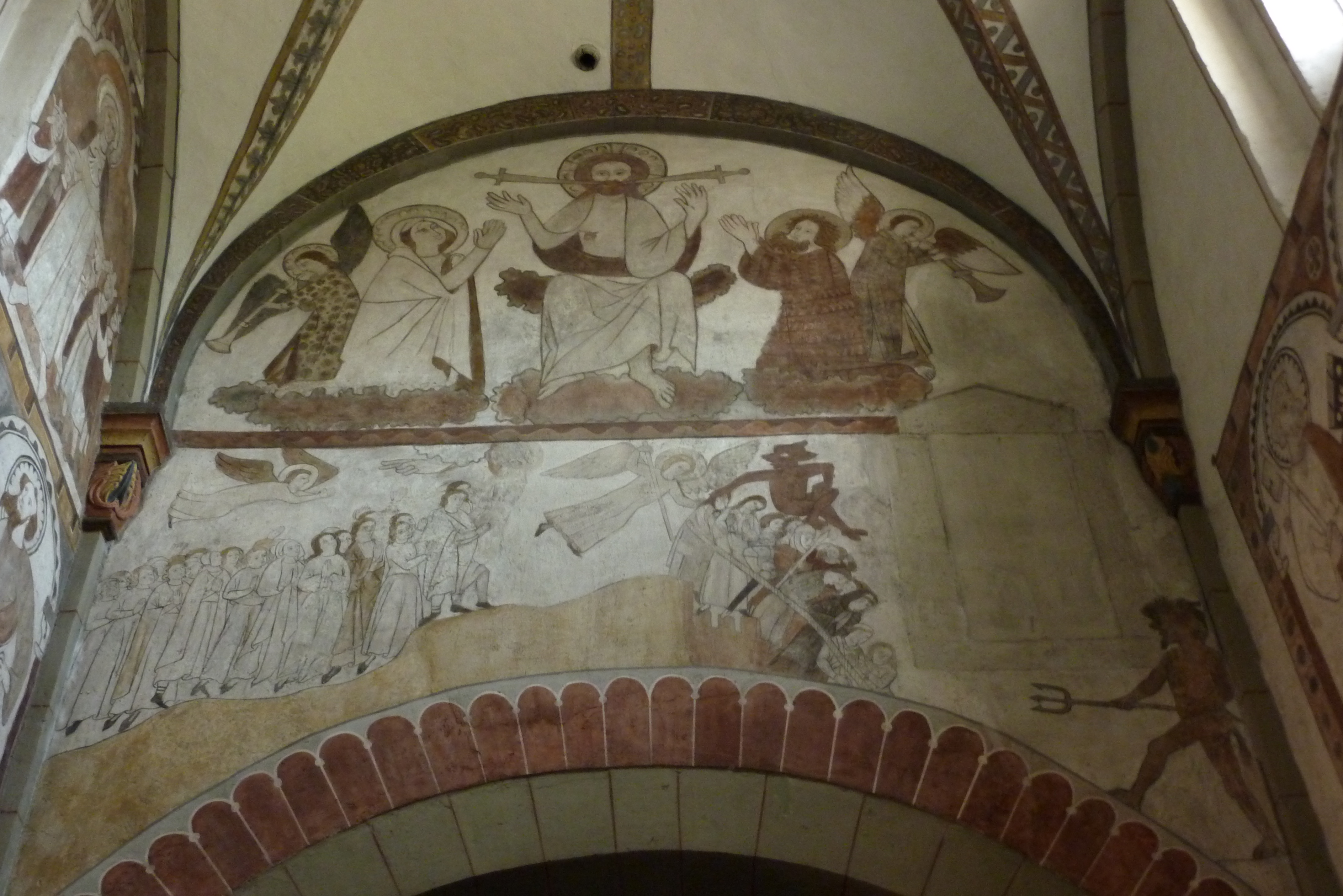 Katholische Pfarrkirche St. Cyriakus in Niedermendig, Wandmalerei zweite Hälfte 13. Jahrhunderts, Jüngstes Gericht